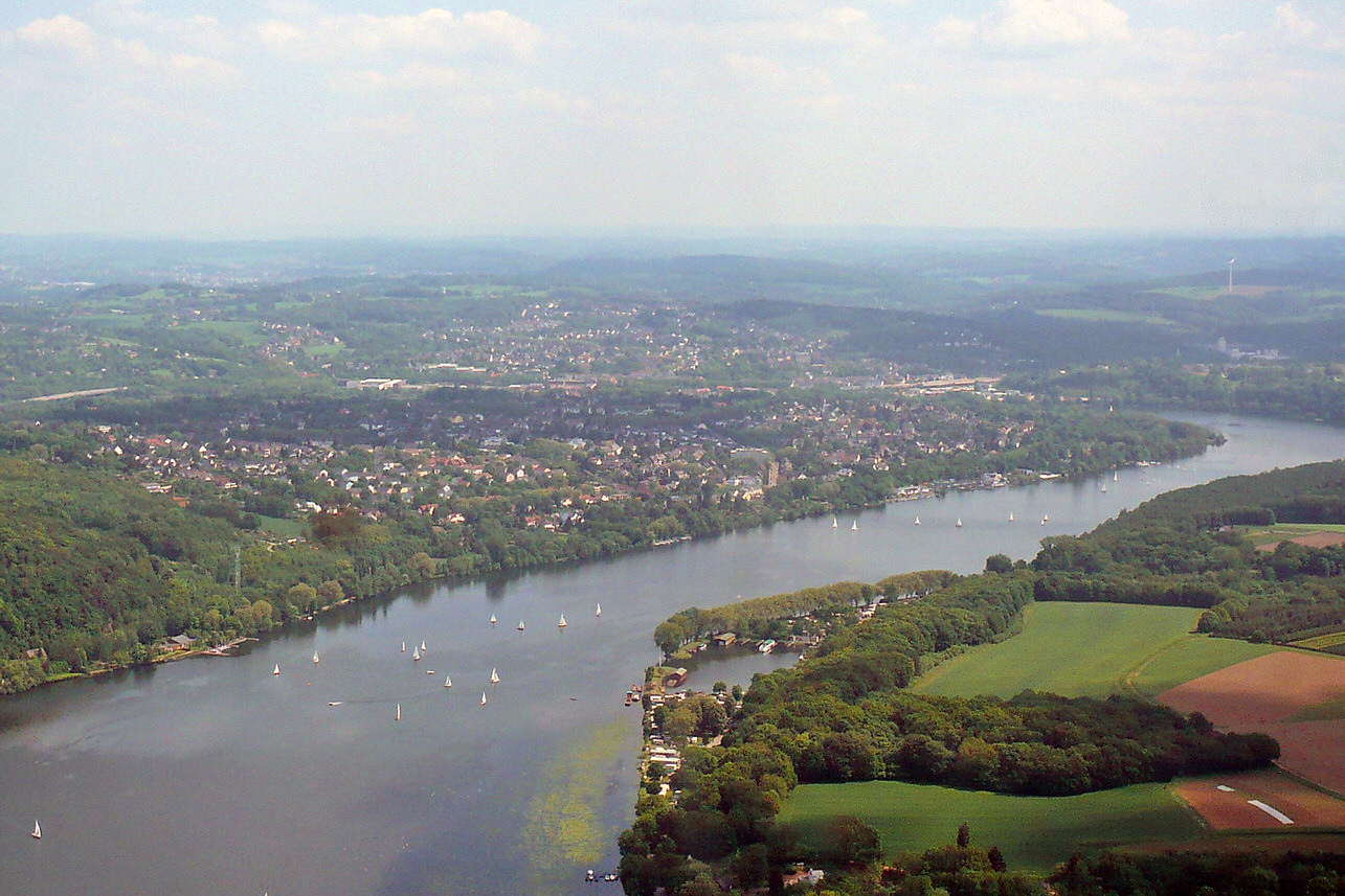 Essen, Stadtteil Heisingen auf der Ruhrhalbinsel; dahinter der Stadtteil Kupferdreh